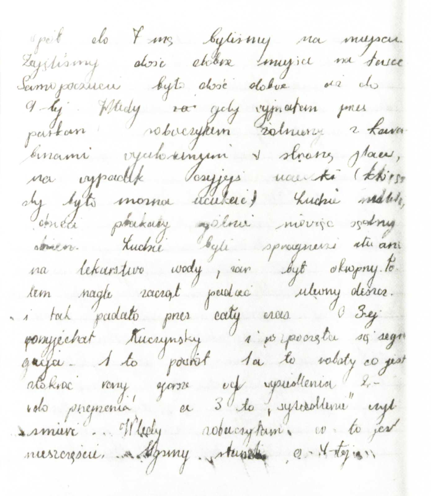 Rutka Laskier diary February 6, 1943 excerpt 1 = Rückkehr ins Ghetto; 1a = Zwangsarbeit; 2 = Prüfung; 3 = Umsiedlung